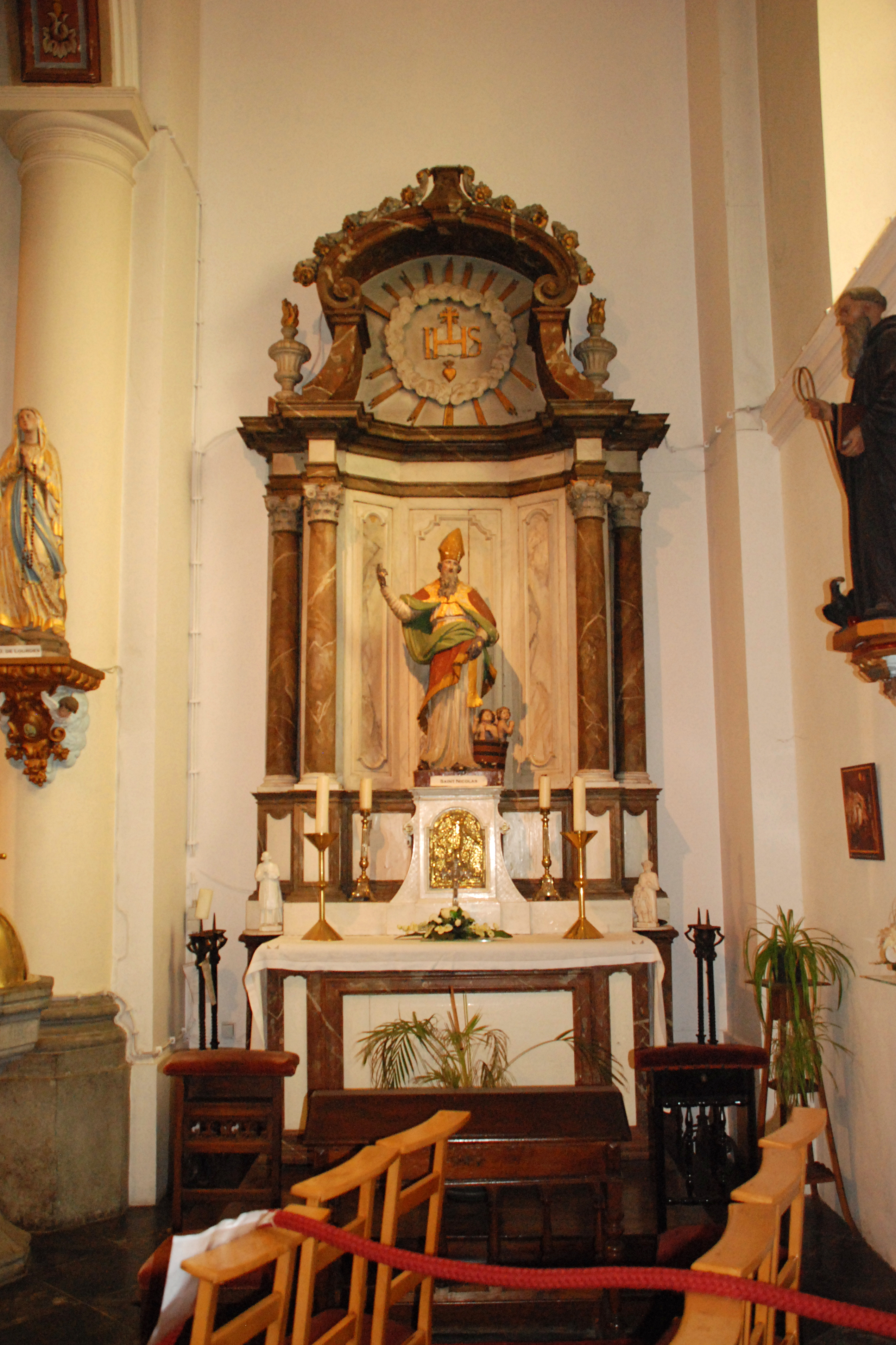 Belgique - Bousval - Église Saint-Barthélemy de Bousval